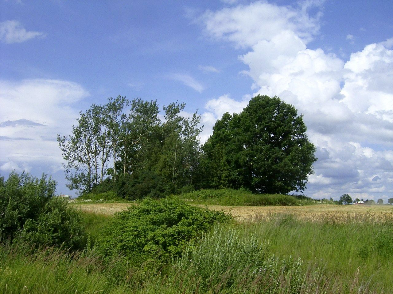 Ehemaliger Friedhof von Klein Ballupönen, Gebiet von Kaliningrad